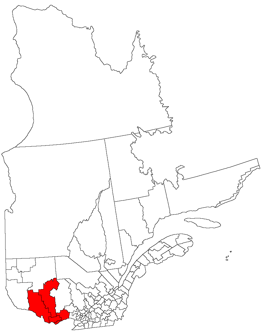 Outaouais region, Quebec